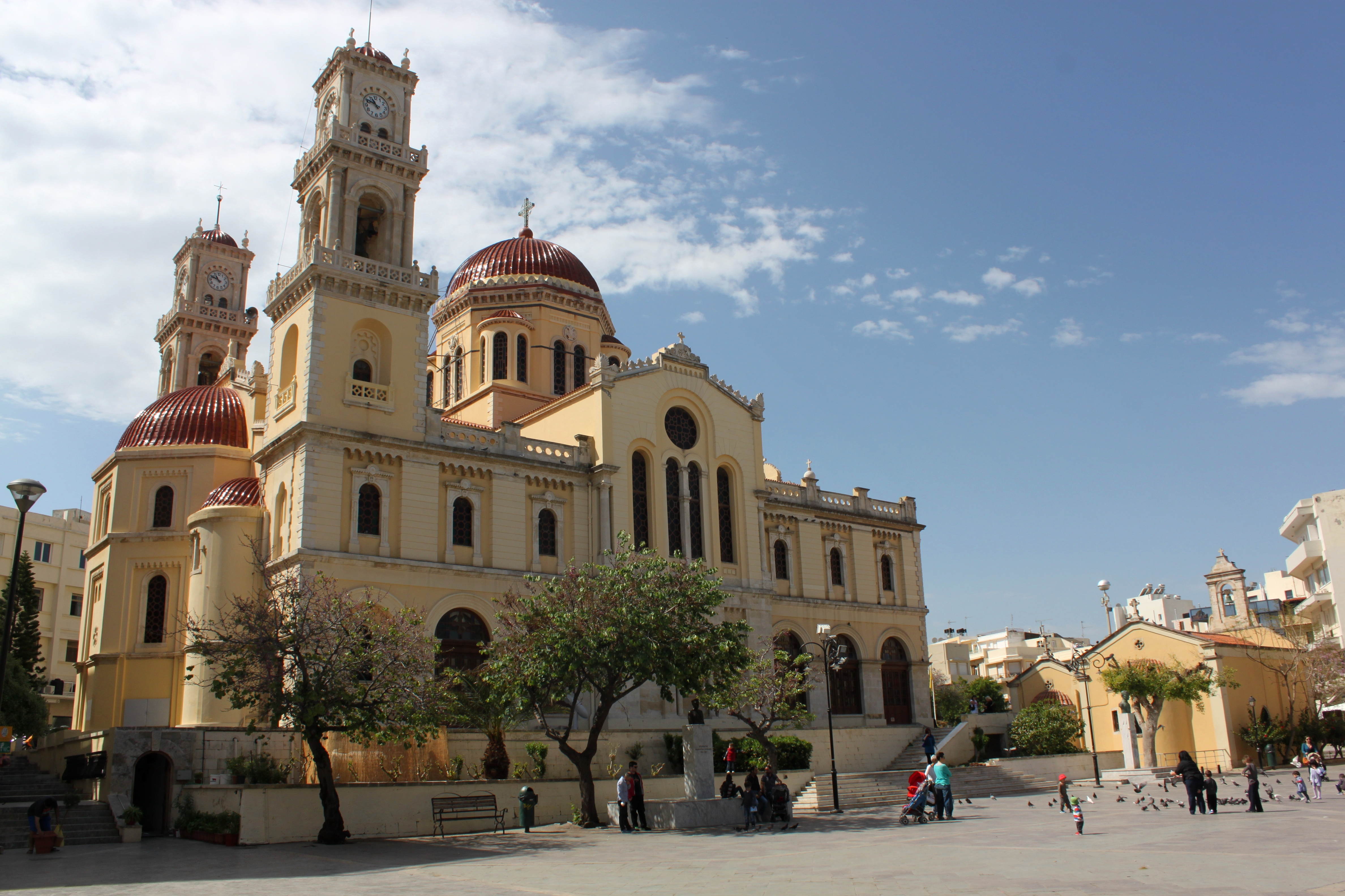 Cathédrale Agios Minas d'Héraklion vue depuis le parvis nord